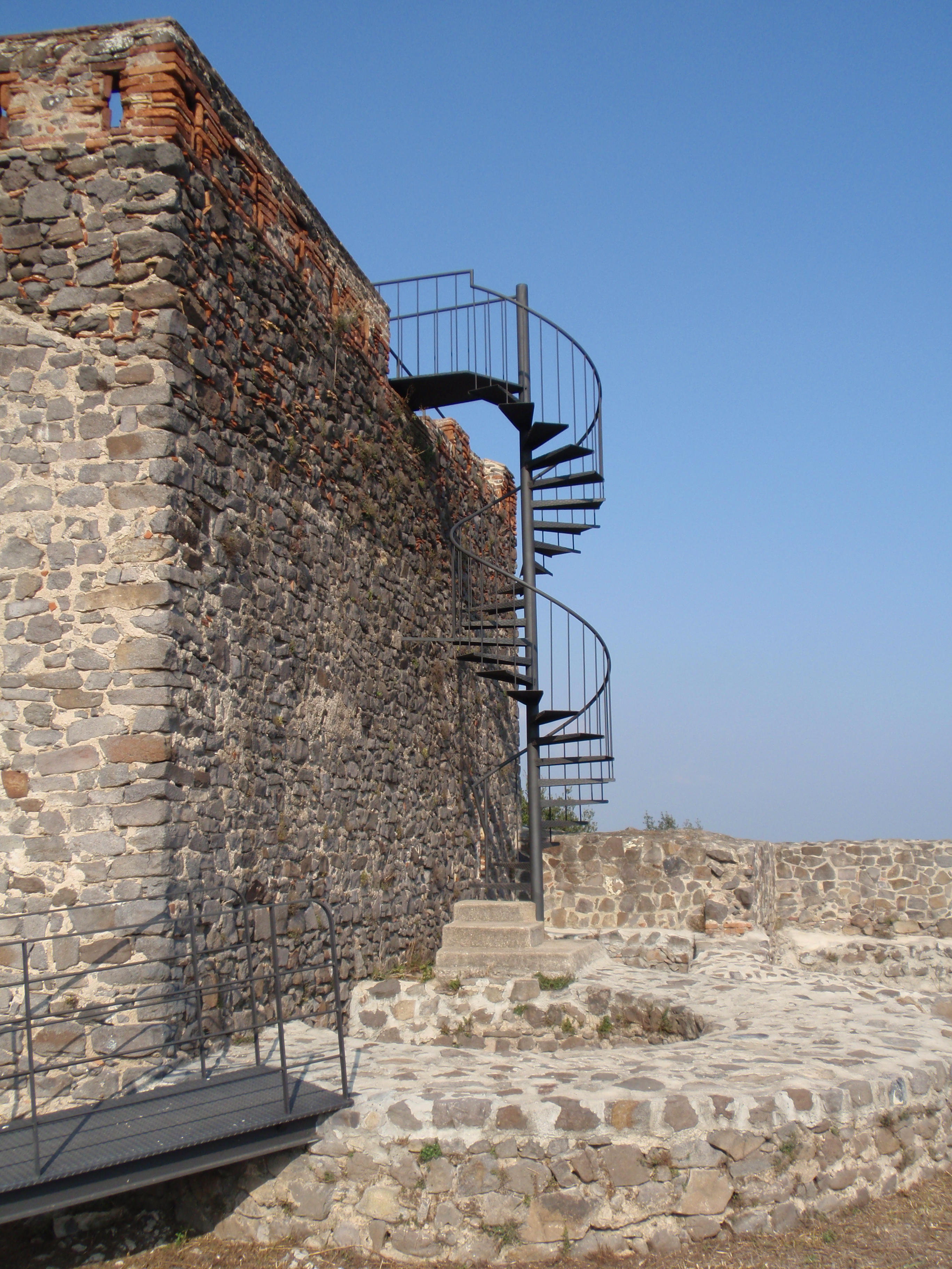 Castell de Torcafelló (Maçanet de la Selva). Torre de l'Homenatge